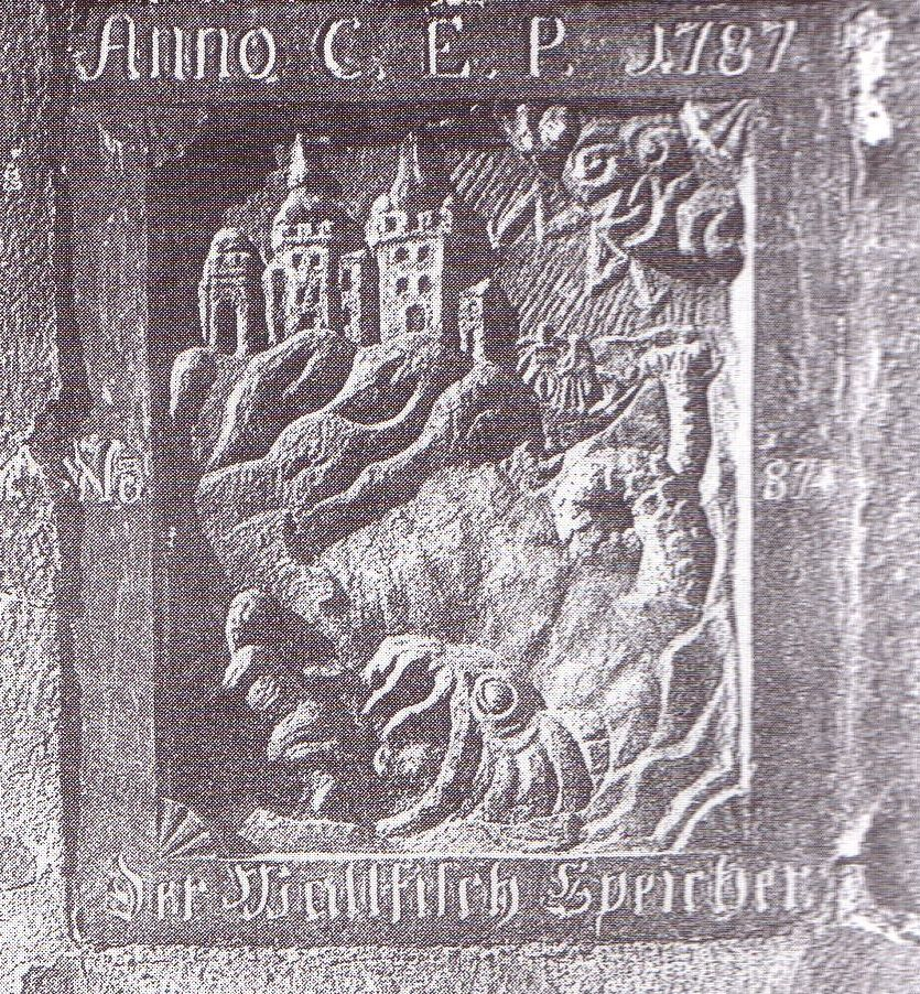 Magazine tag in the Königsberg harbor